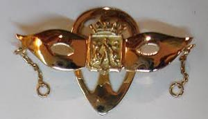 El Antifaz de Oro es el máximo galardón para cualquier carnavalero gaditano